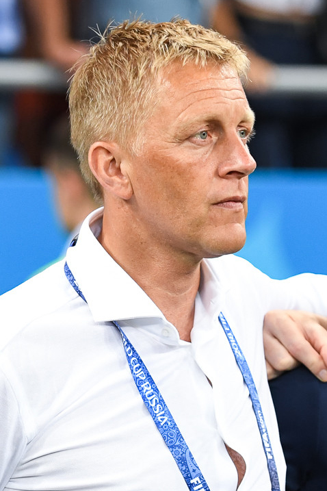 Сборная Исландии уступает Хорватии и покидает ЧМ-2018